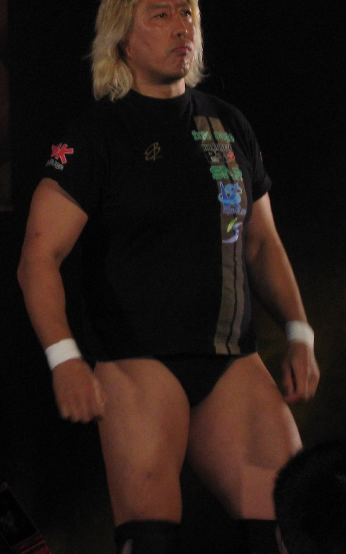 2011年11月12日 大阪府立体育会館 「POWER STRUGGLE」 高山善廣